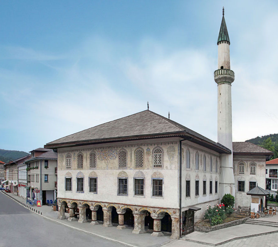 Šarena džamija u Travniku